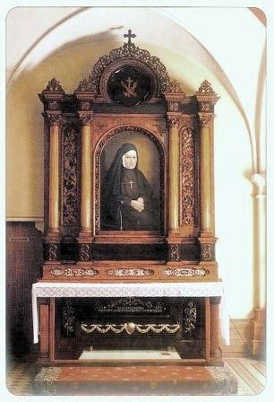 relikwie